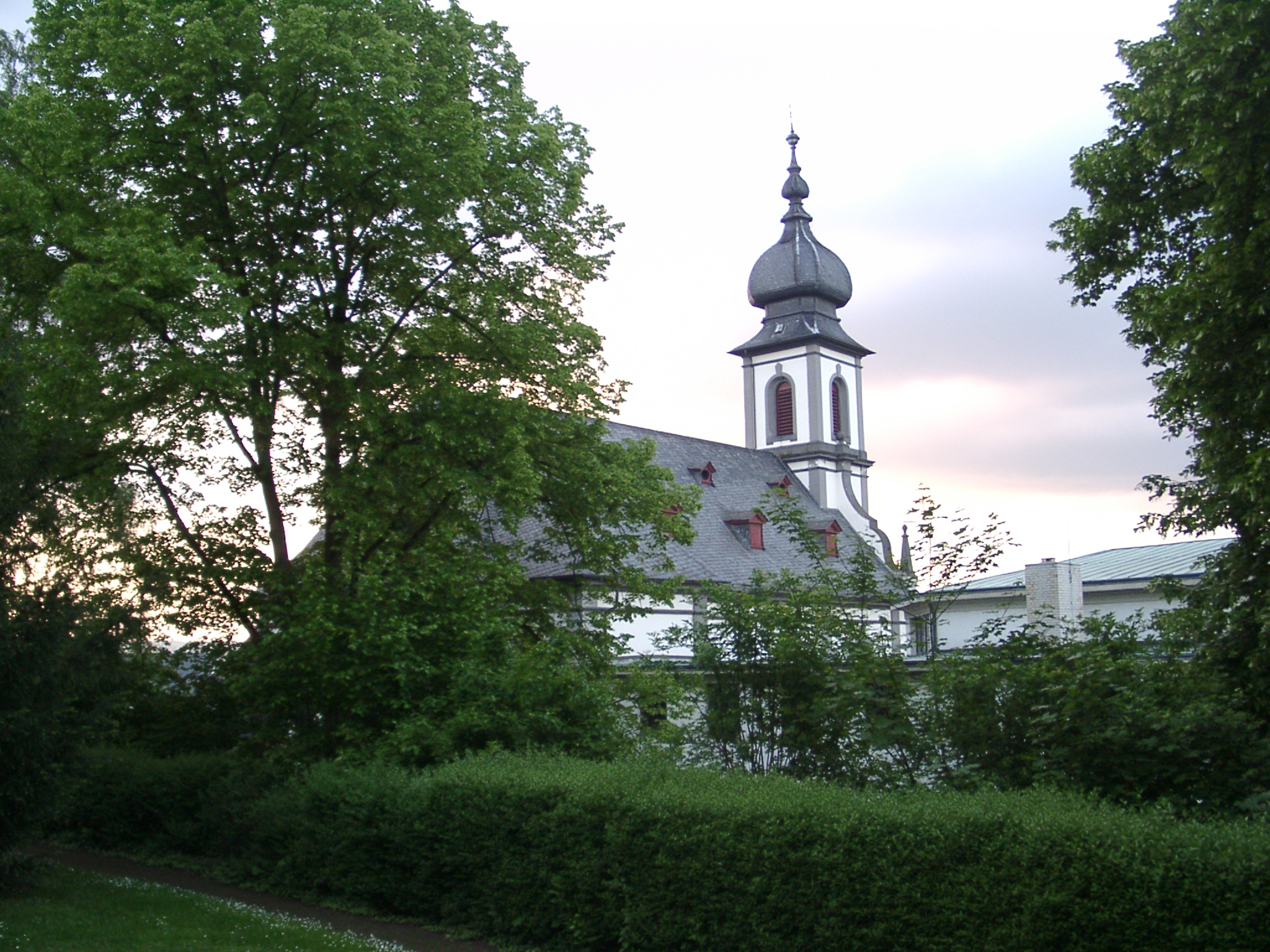 Pfarrkirche St. Cäcilia Saffig